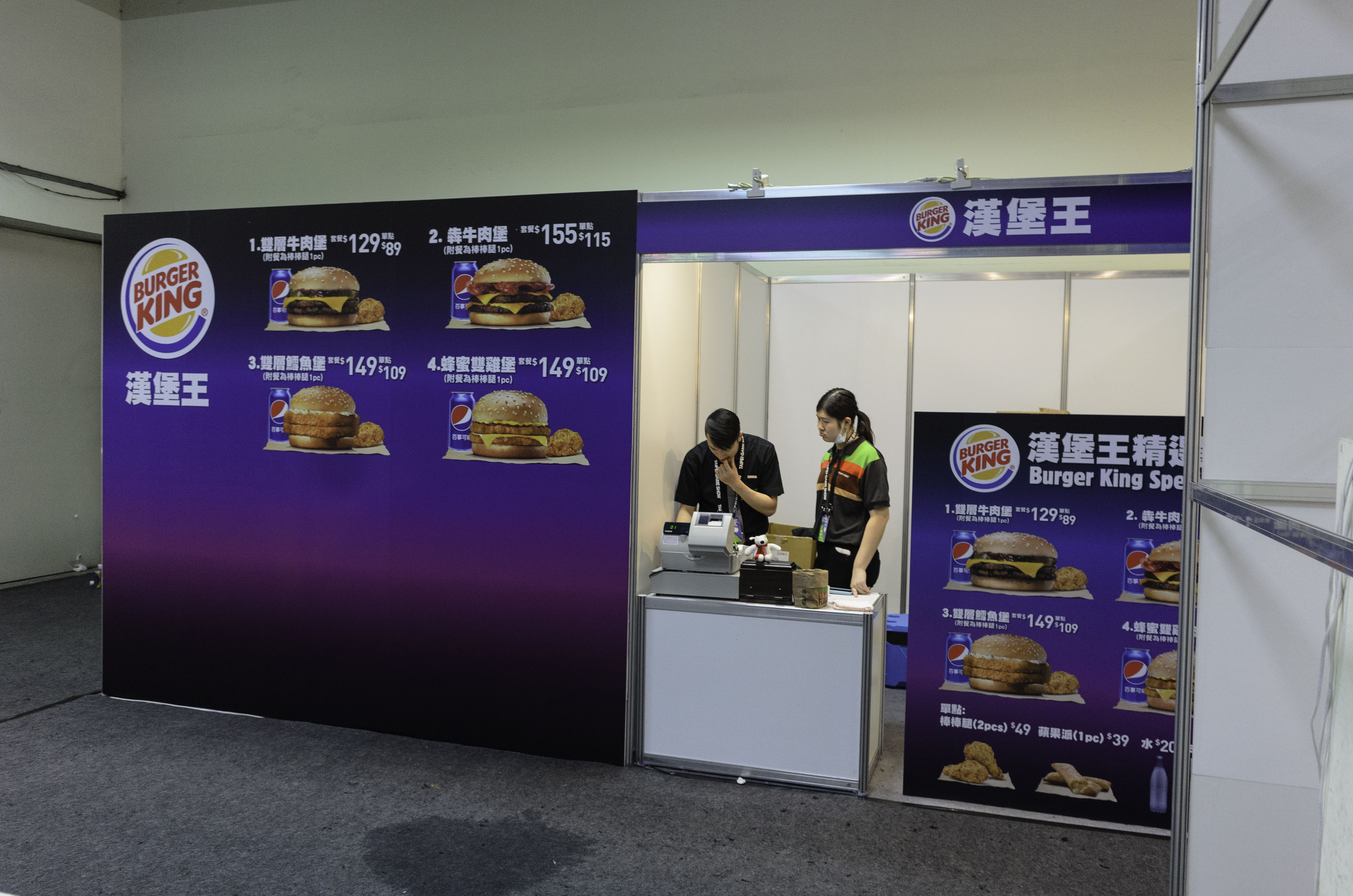 中文（台灣）: 2019臺北國際電玩展世貿三館展區，漢堡王攤位。